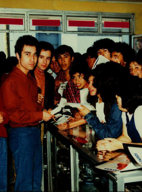 Los Prisioneros en Calama en 1990, como parte la promoción de Corazones.